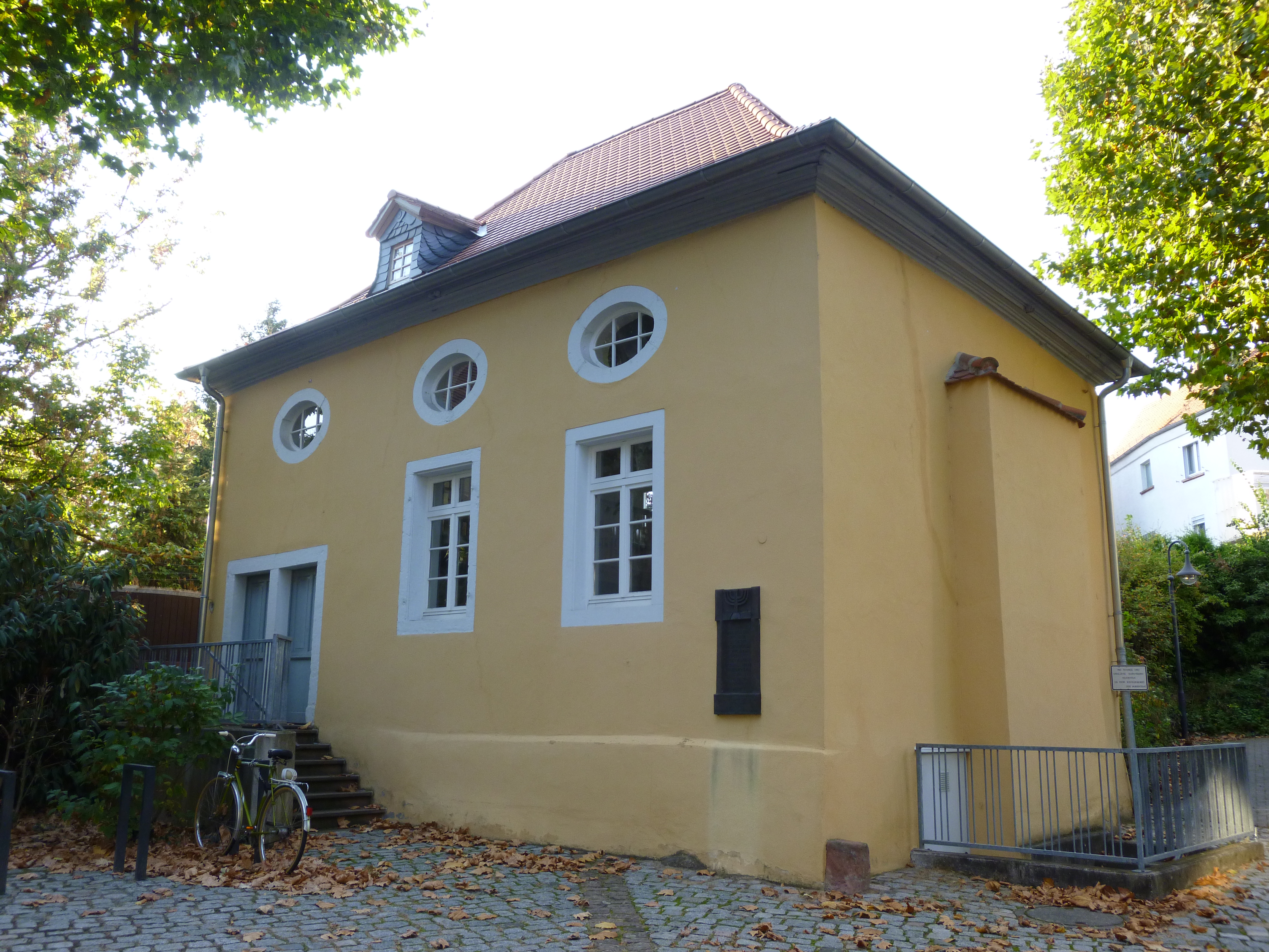 eksa sinagogo Bachgasse 28 en Bensheim-Auerbach